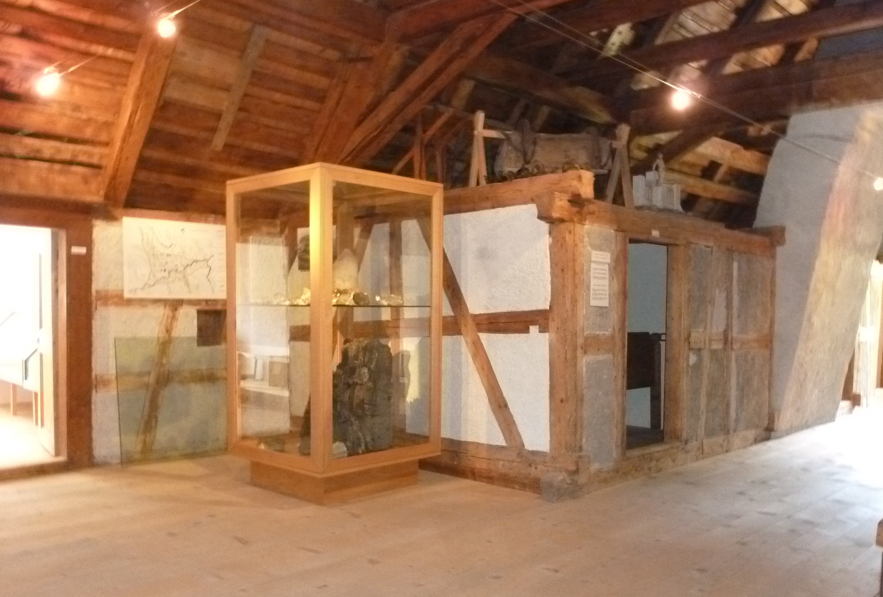 Cuort Ligia Grischa Dachgeschoss